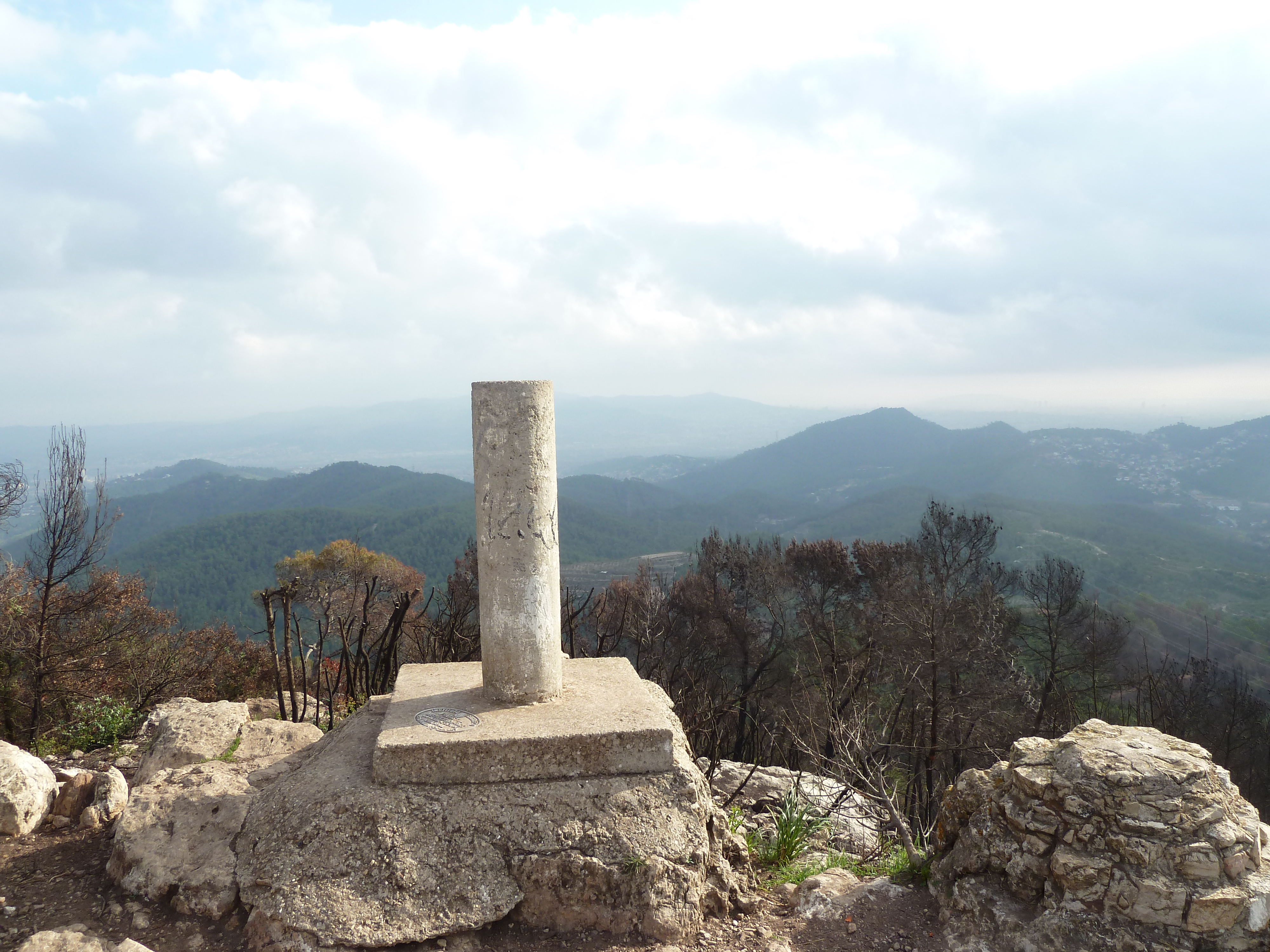 Vista del cim del Puig Vicenç després de l'incendi de juliol del 2013